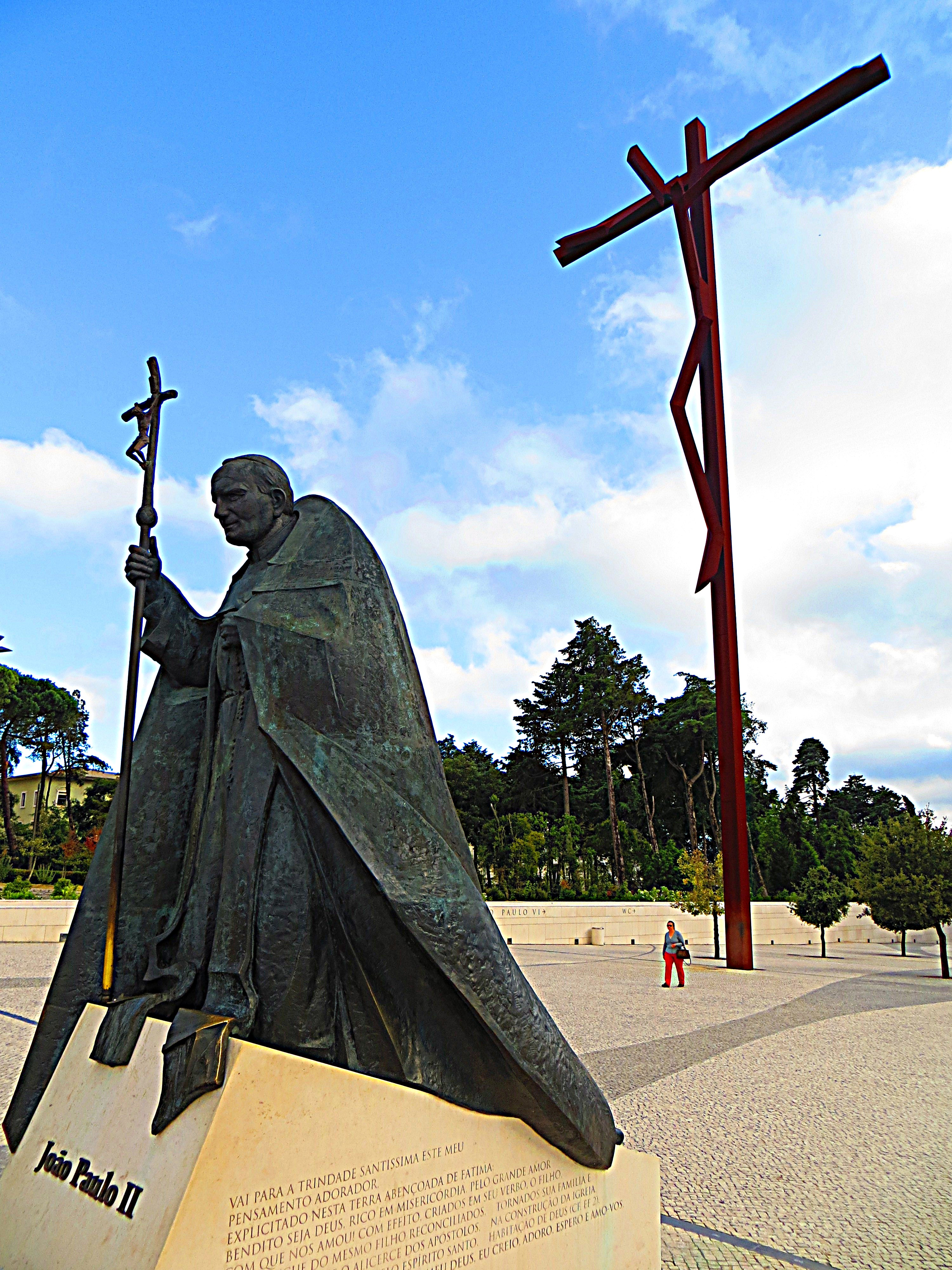 Joao Paulo II